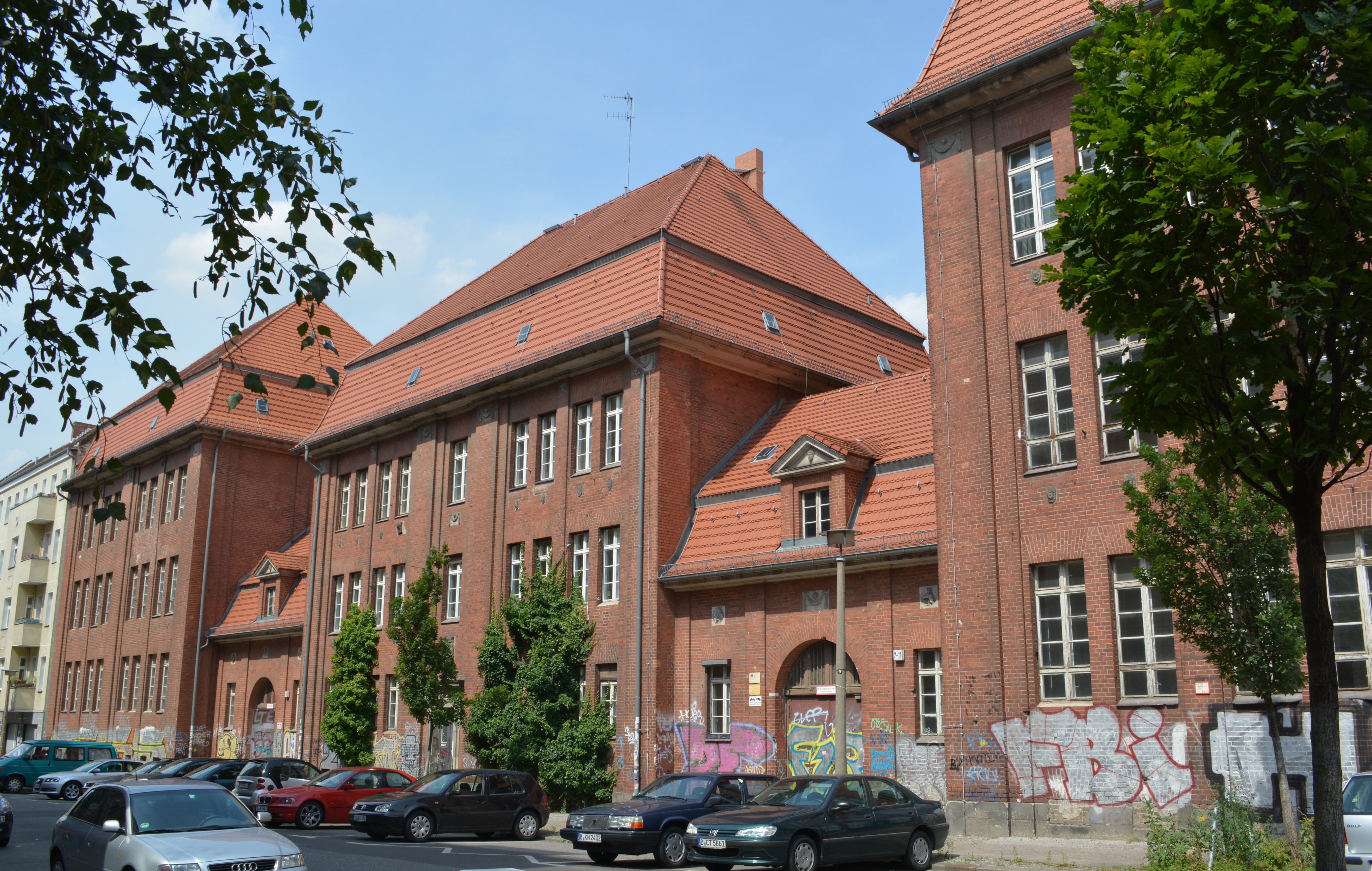 Denkmalgeschützte ehemalige Königstädtische Oberrealschule, erbaut 1910-1911 von Ludwig Hoffmann